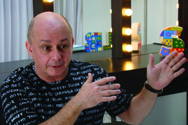 Bailarino e coreógrafo brasileiro Rodrigo Pederneiras em imagem do acervo da TV Brasil.